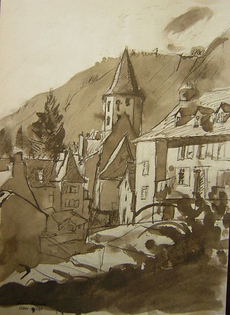 Vue du vieux bourg de Vic-sur-Cère, église Saint Pierre de Vic. Lavis de Victor Fonfreide (1872-1934)